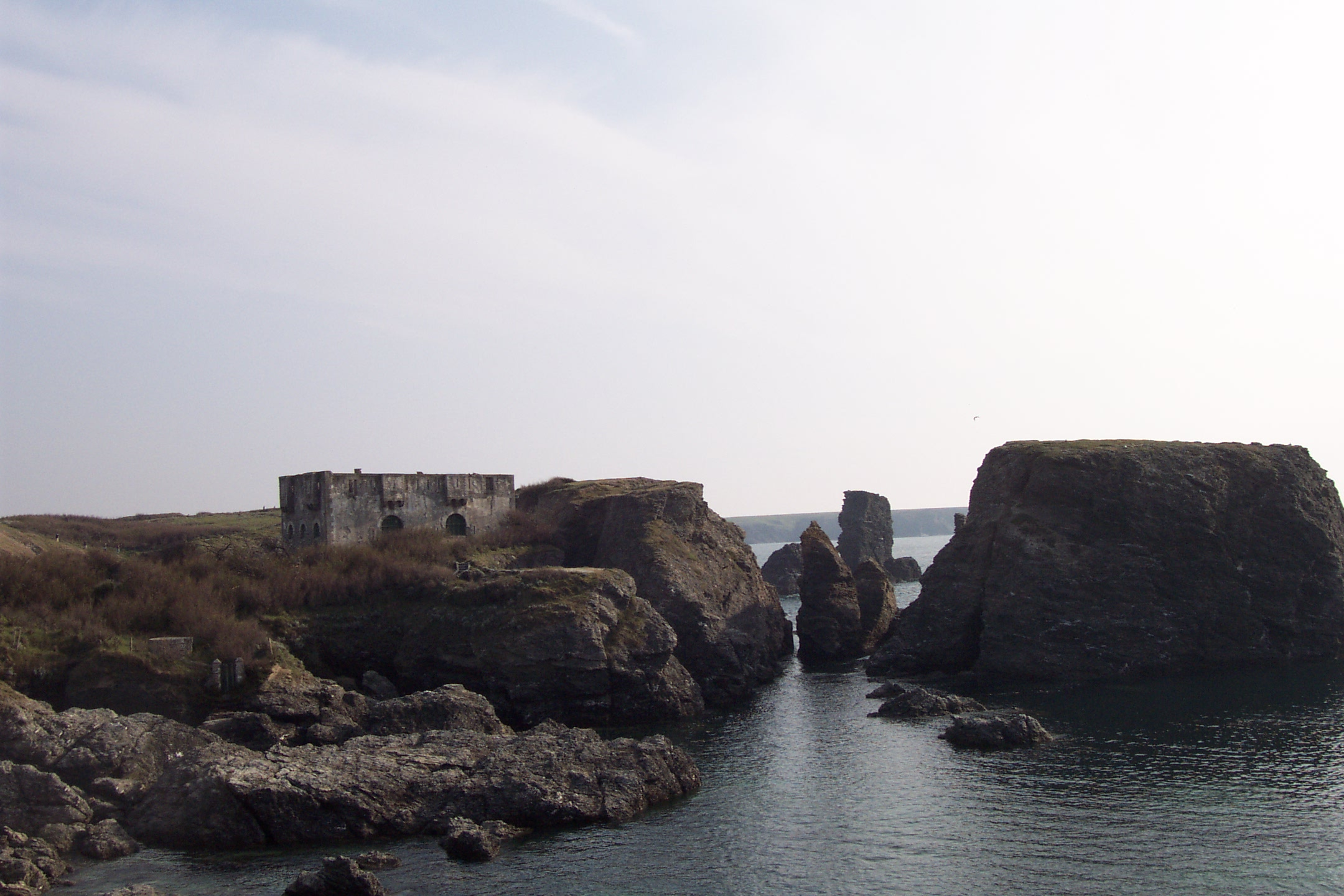 Belle-Île-en-Mer (Morbihan, France), fortin de Sarah Bernhardt.